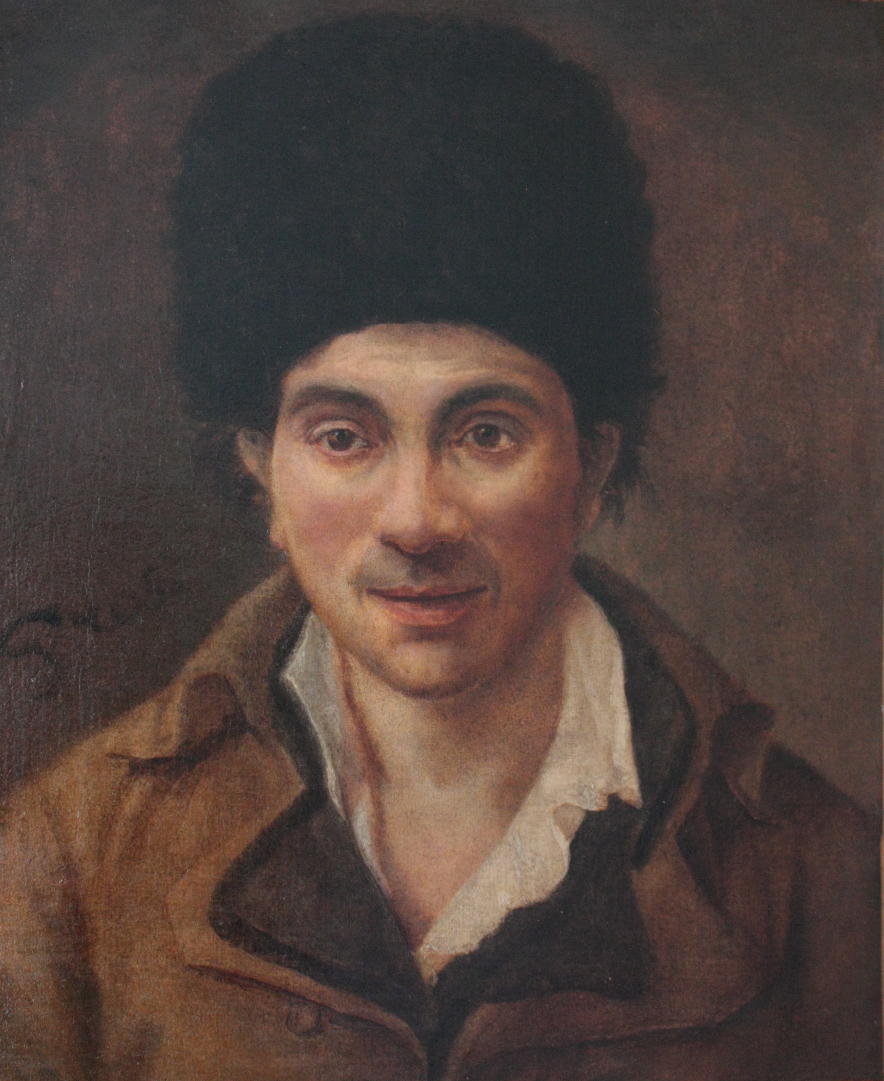 Portrait présumé du Cordonnier Simon, attribué à Antoine-Jean Gros, 1794-1795